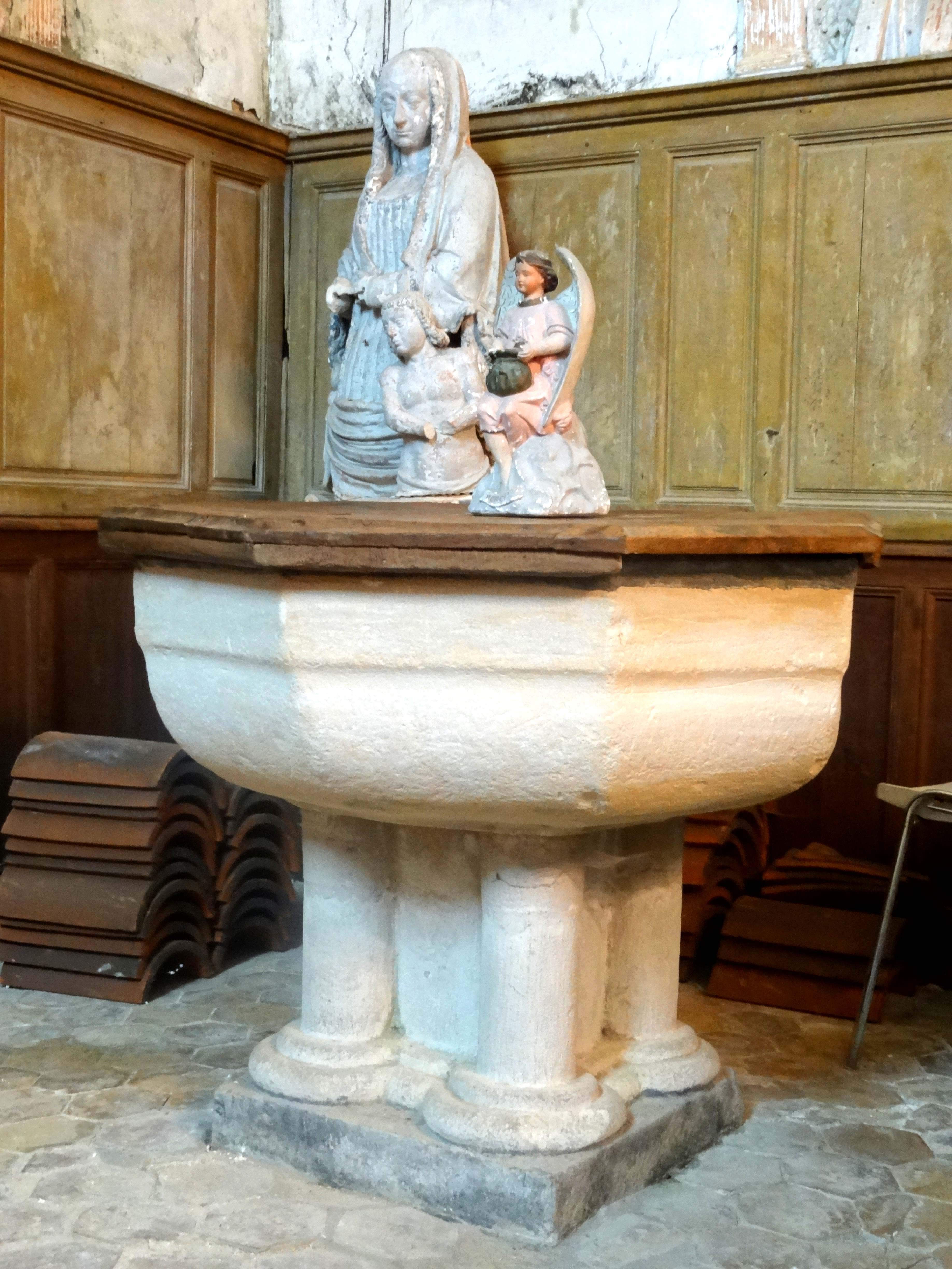 Mobilier de l'église - voir titre.